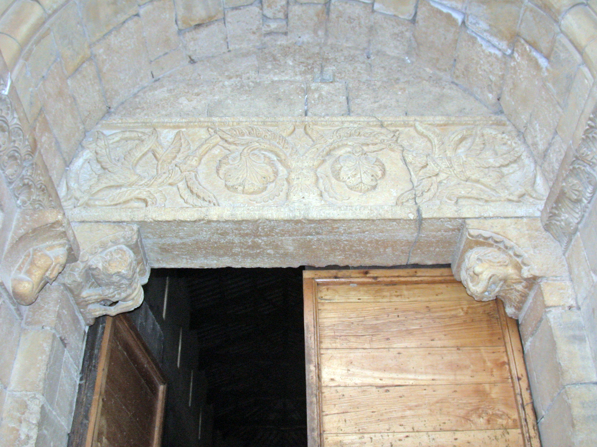 Italia, Toscana, provincia di Siena, Montalcino, Abbazia di Sant'Antimo, architrave del portale di ingresso sulla facciata